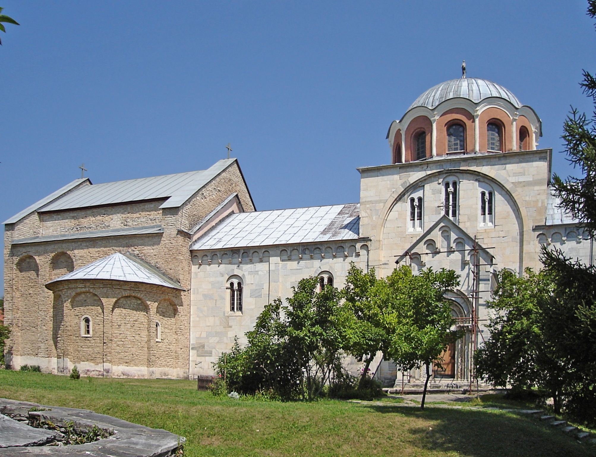 Klášter Studenica v Srbsku, nedaleko od Kraljeva